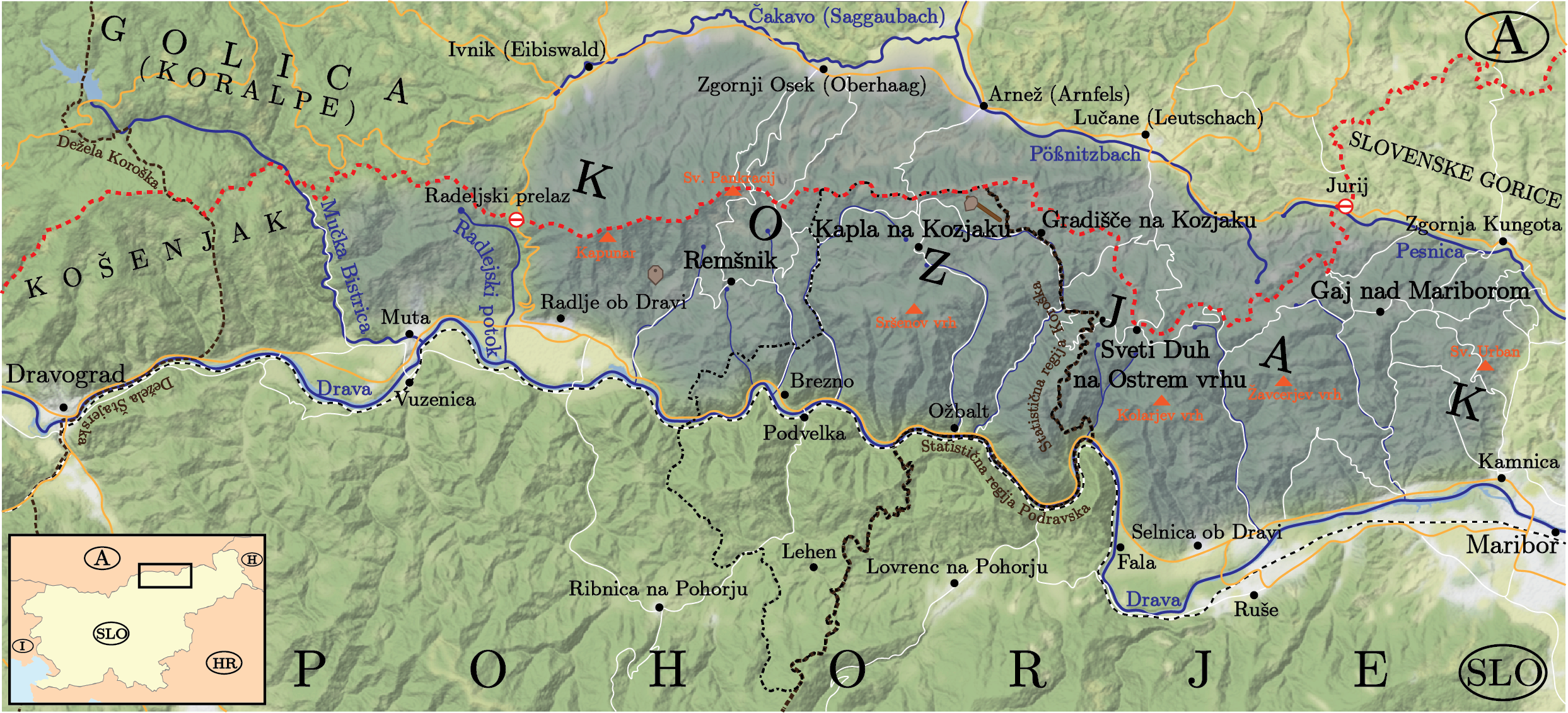 Geografska lokacija pogorja Kozjak